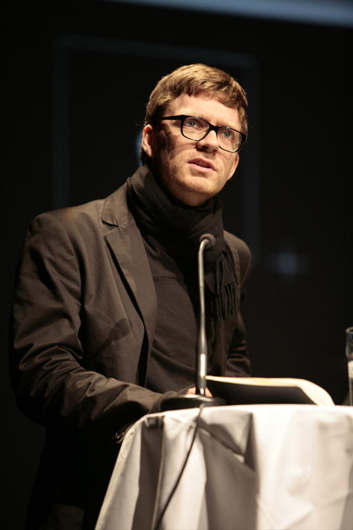 Tuomas Toivonen